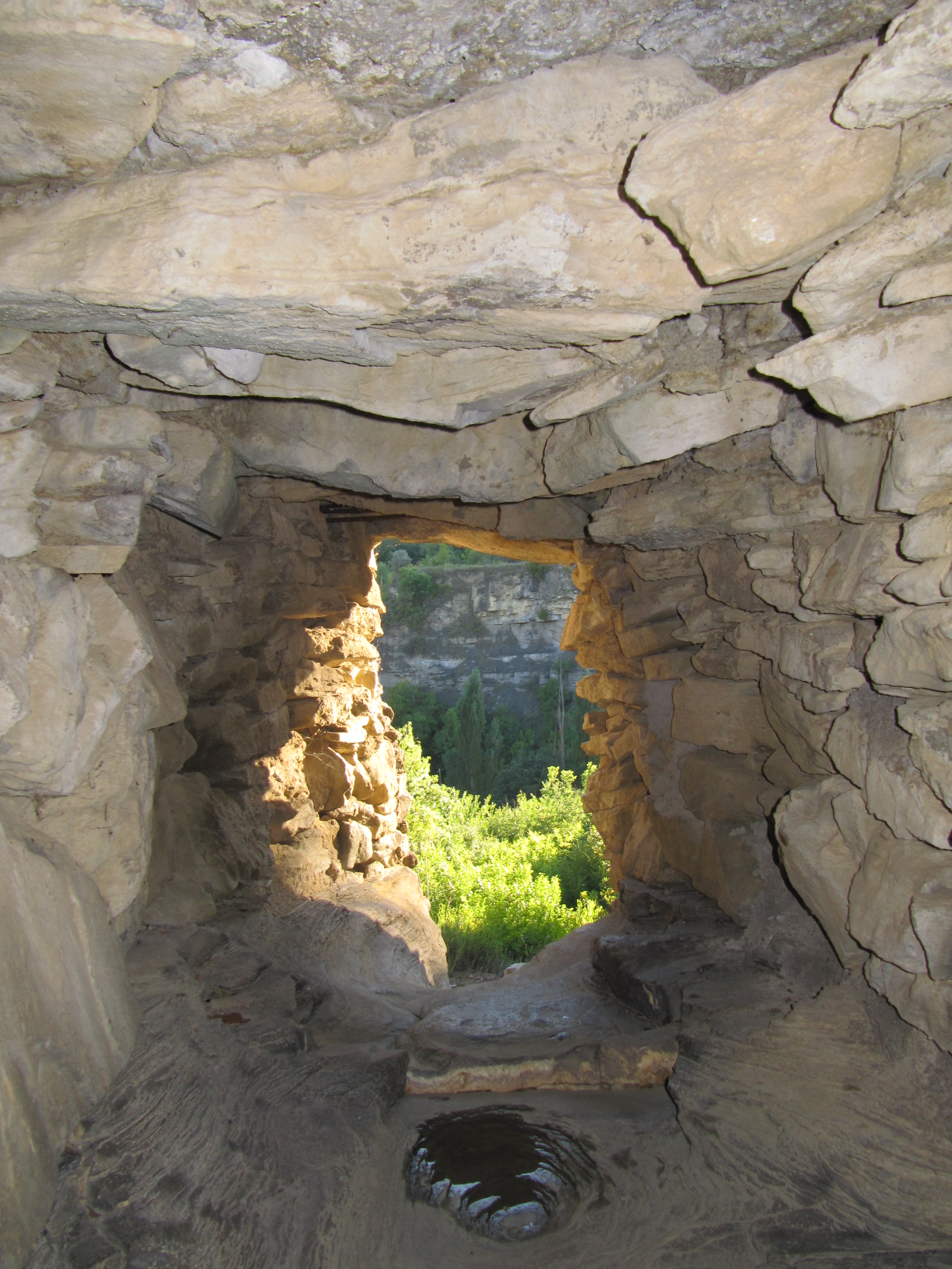 Les fibles són obertures regulars a la part inferior de les parets que permeten el pas de l'aigua de pluja i eviten que aquesta afecti a la construcció (Pedres, parets i paredadors per Josep Portella Coll. Ciutadella: Col·lectiu Folklòric de Ciutadella. Quaderns de folklore, núm. 66)